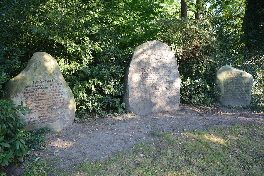 Wistedt Ehrenmal